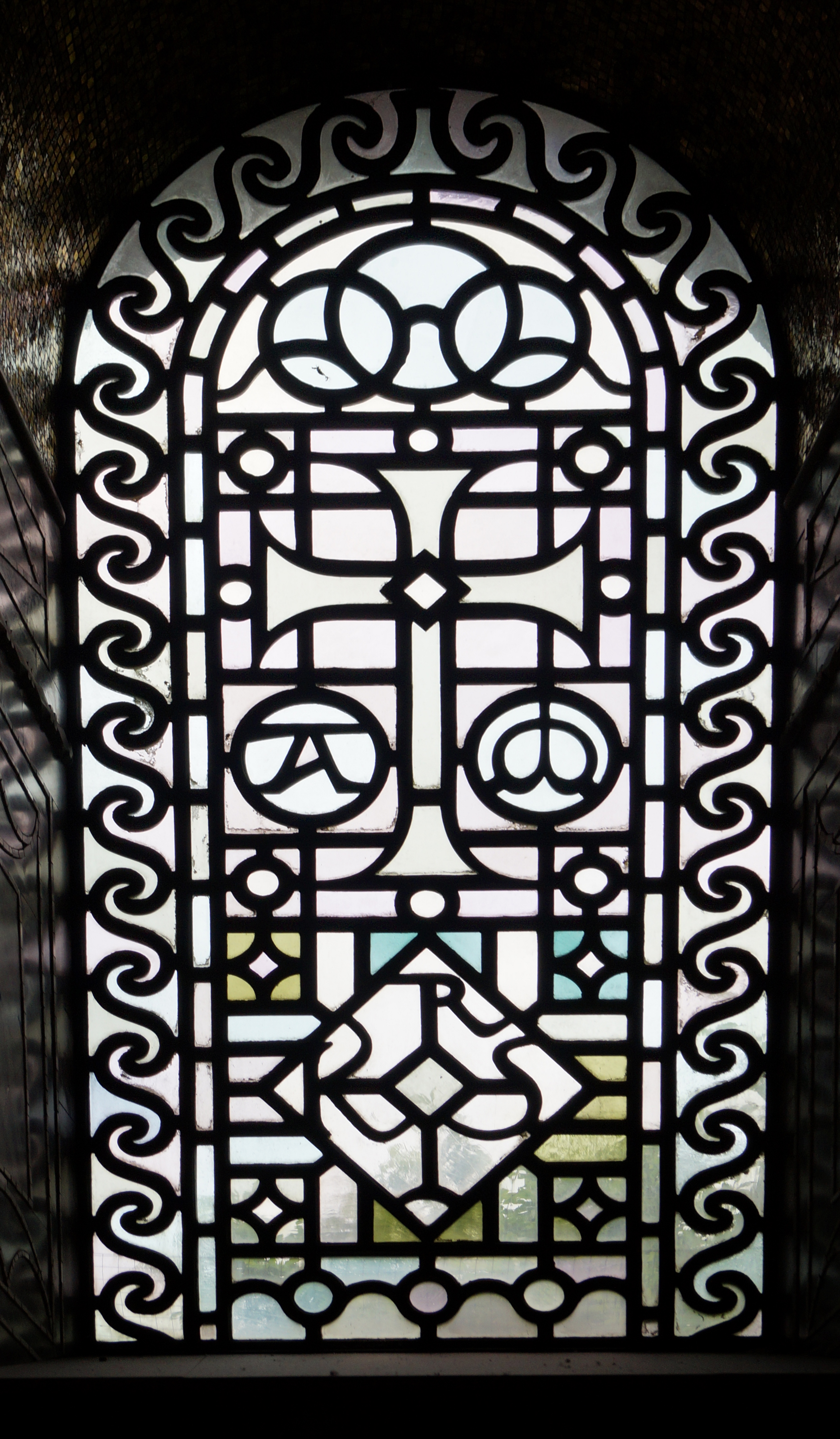 Ornamentfenster. Erdgeschoss Sechzehneck, Hermann Schaper (1853 - 1911)